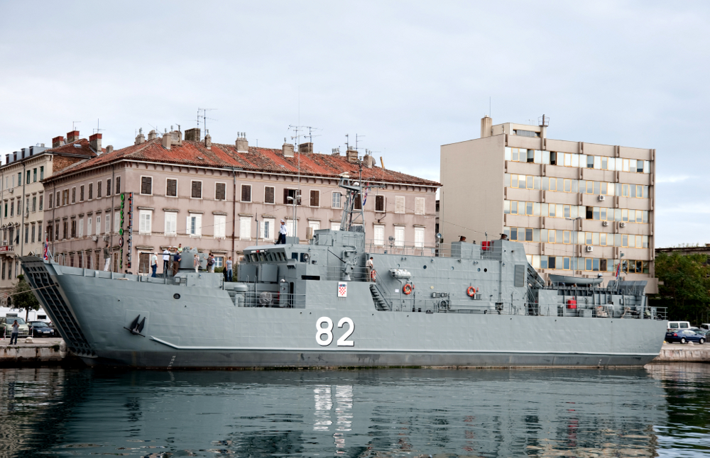 Dan HRM-a, Rijeka